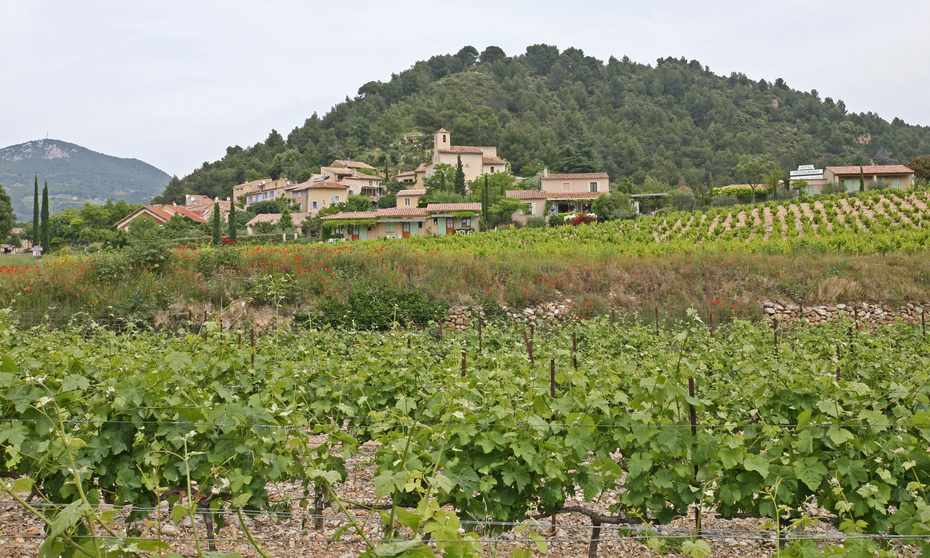 Lafare (commune de Vaucluse)